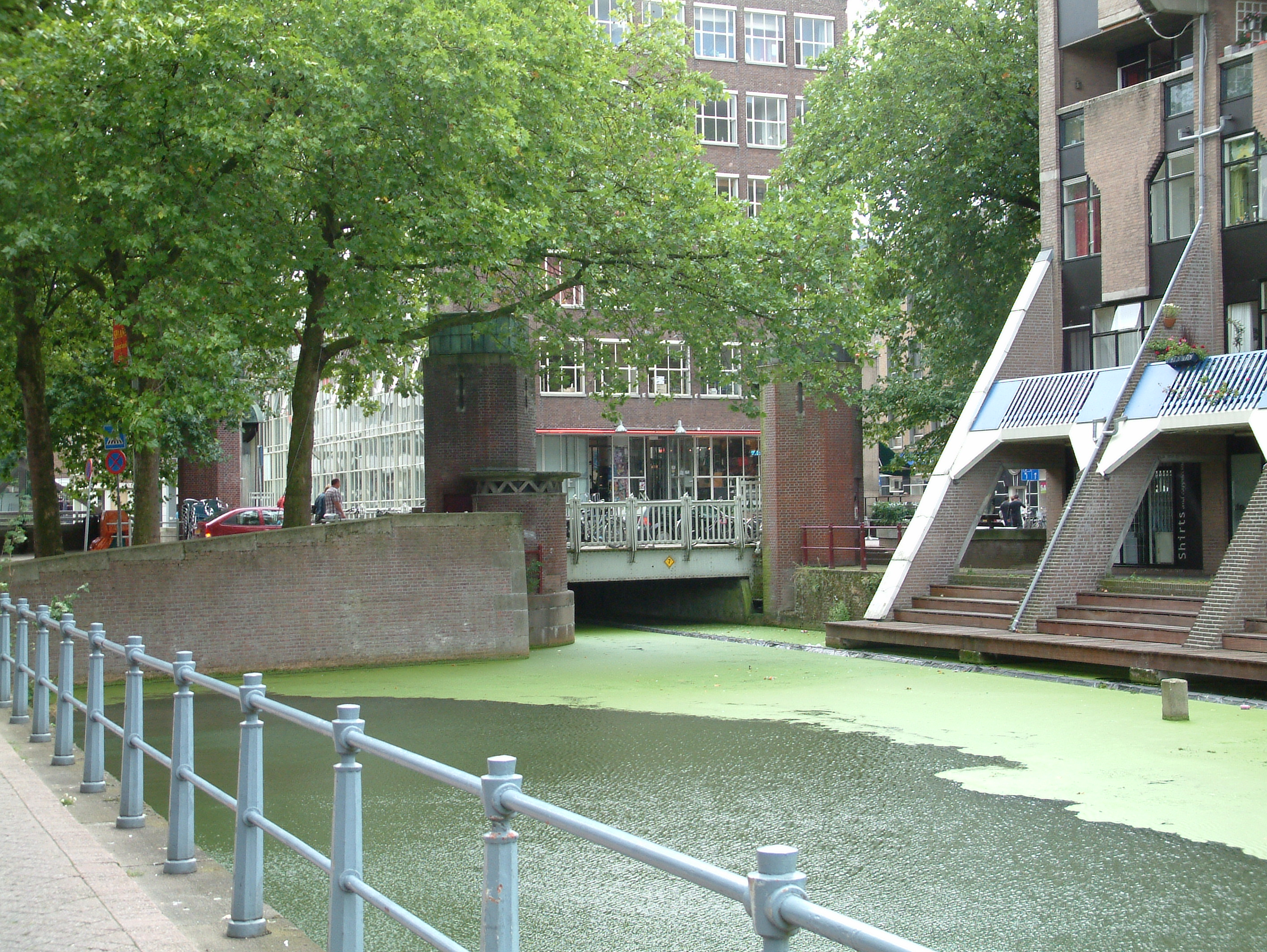 Bruggen over de Rotte, De Meentbrug, noordkant